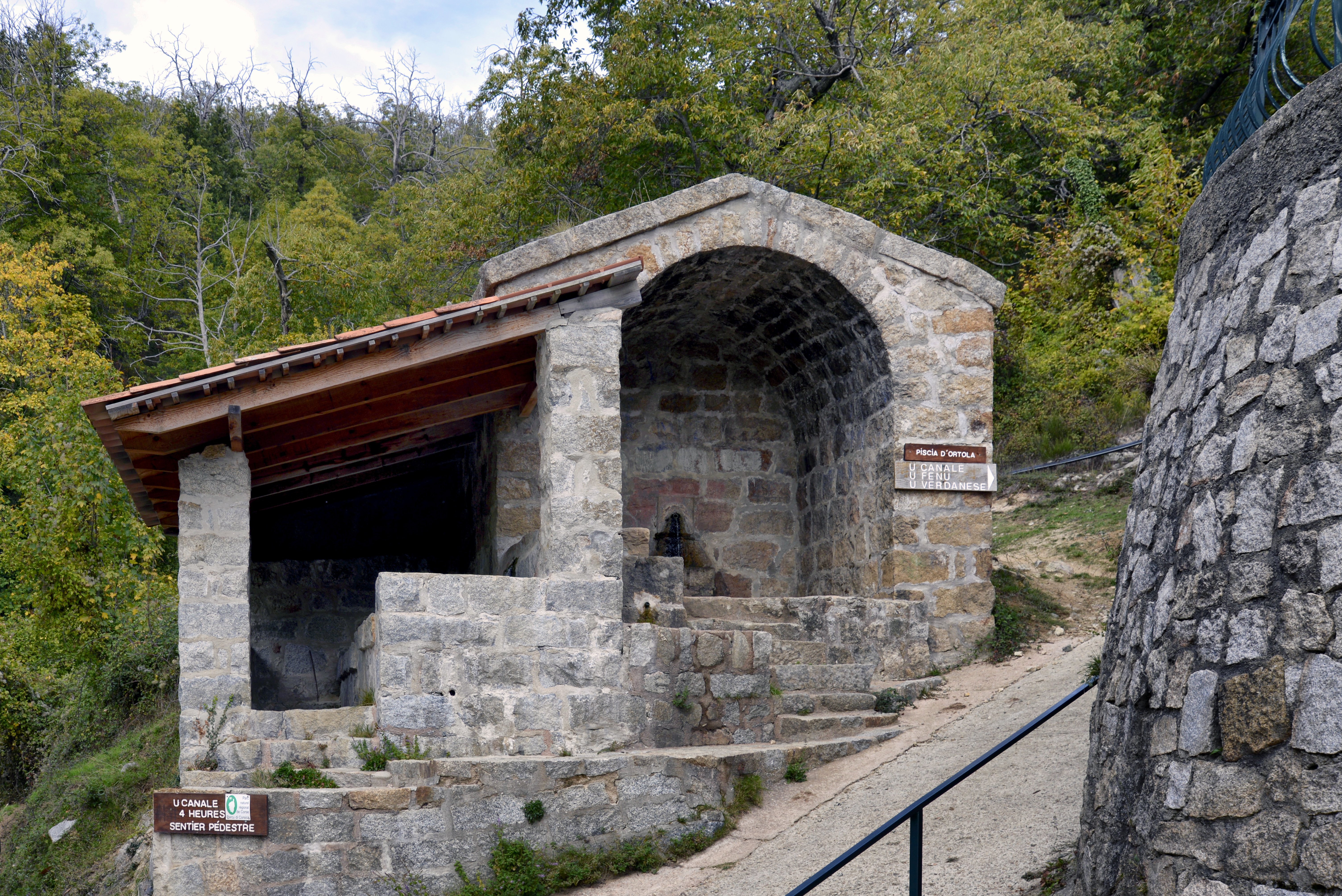 Bastelica, Taravu-Prunelli (Corse) - La fontaine-lavoir de Stazzona, hameau de Dominicacci